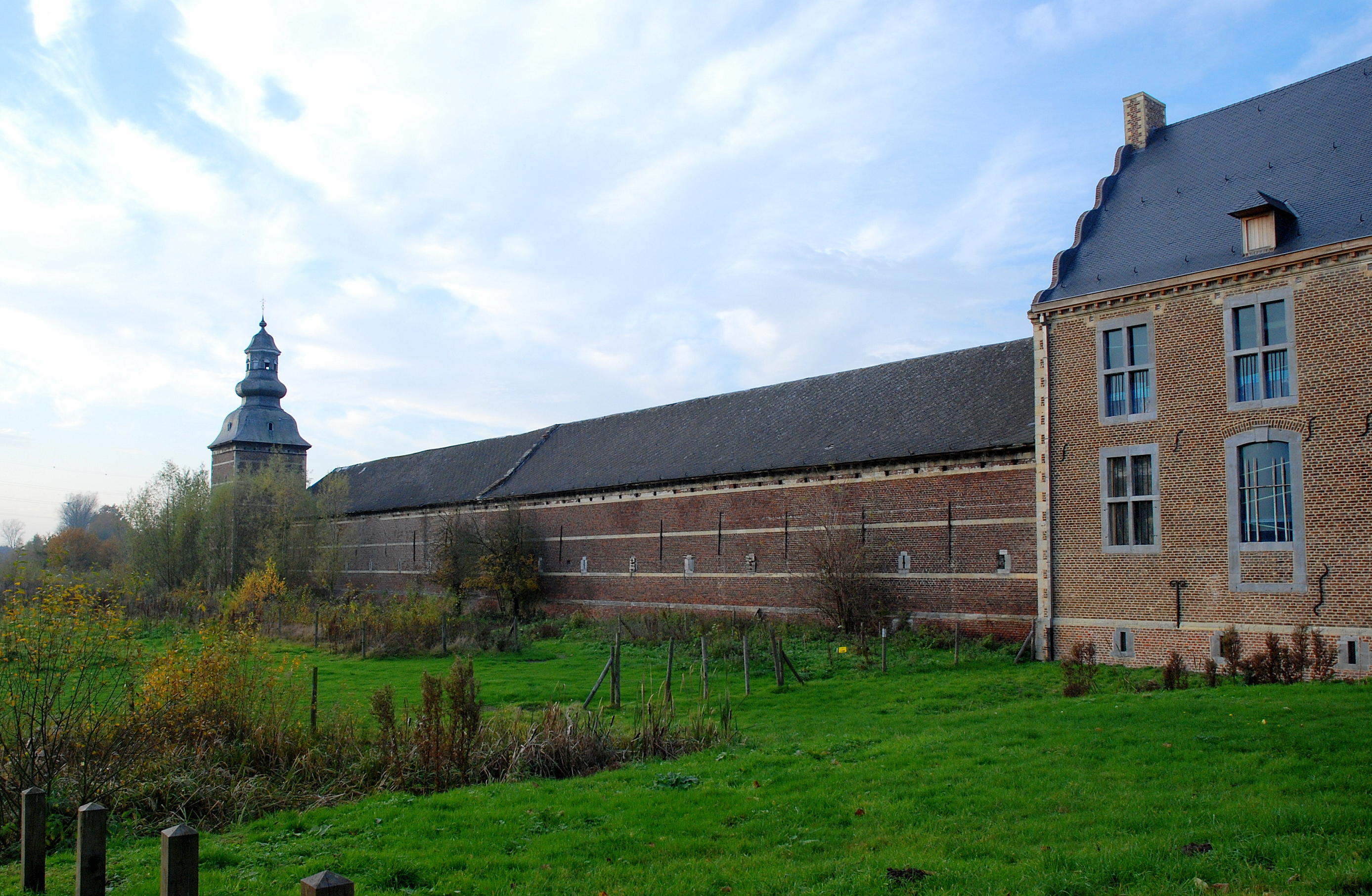 De Herkenrodeabdij te Kuringen, België